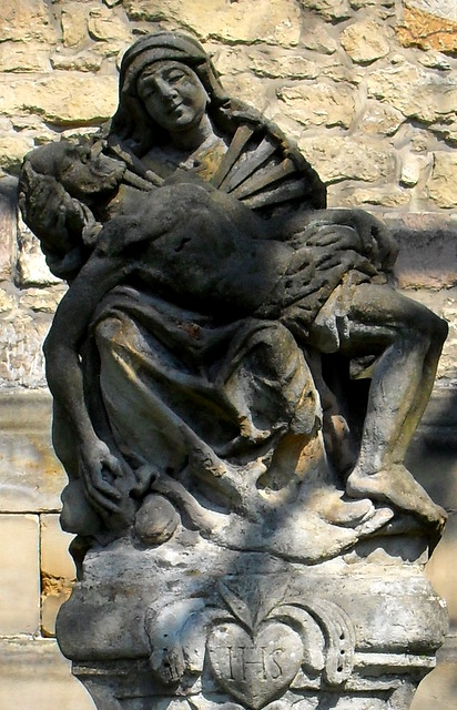 Sychrov, pieta w zamkowm parku